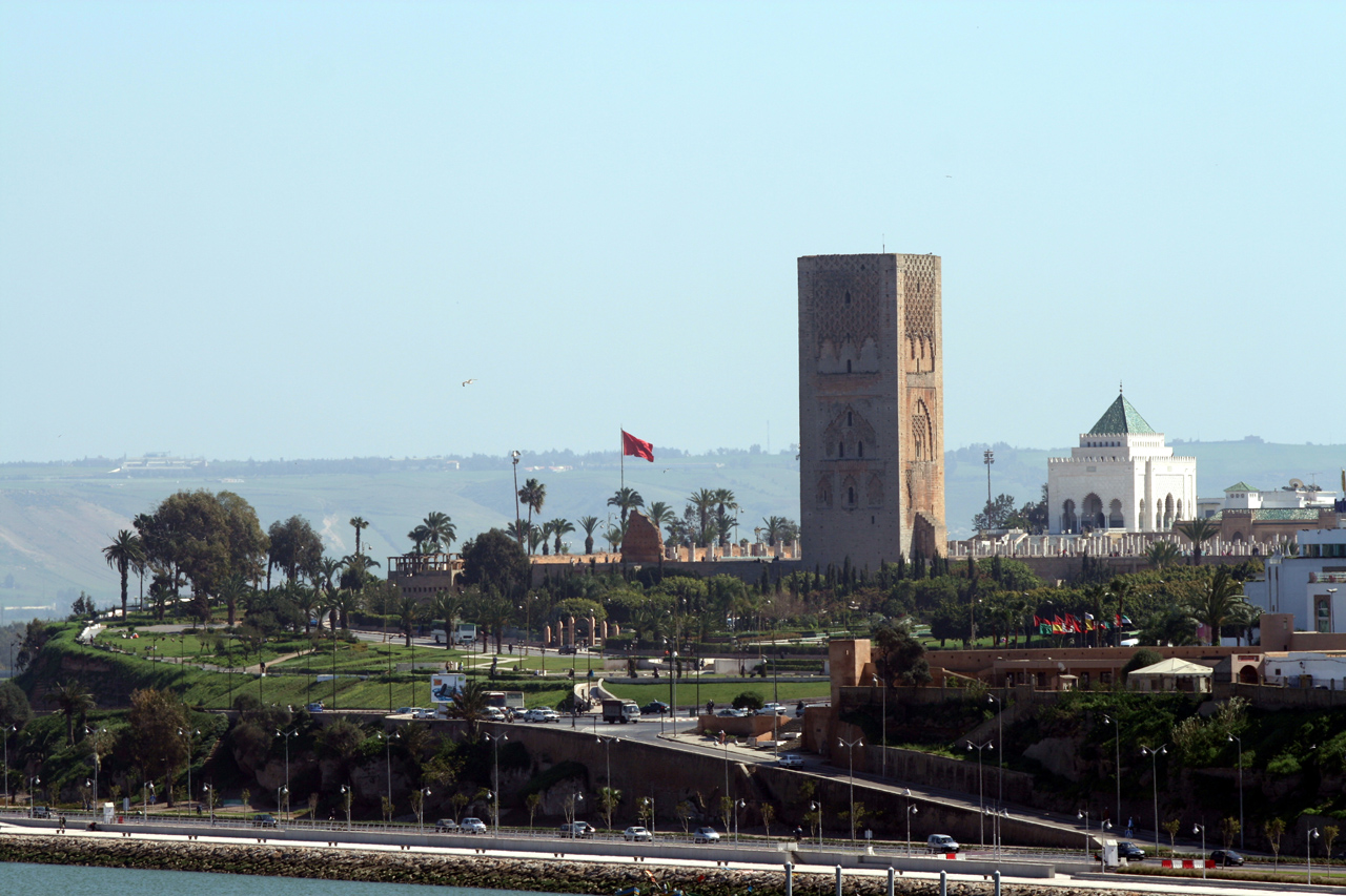 Tour Hassan et mausolee Mohamed V à Rabat